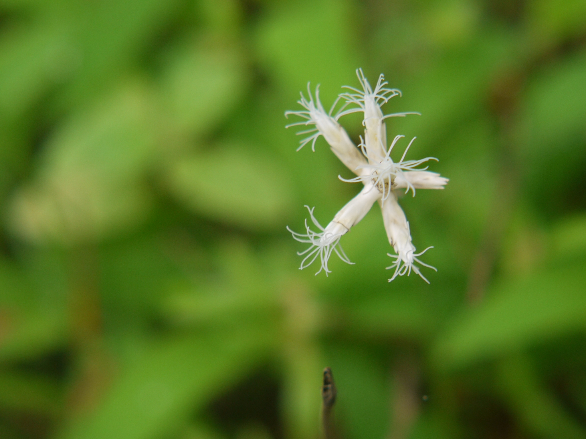 Fimbristylis lawiana